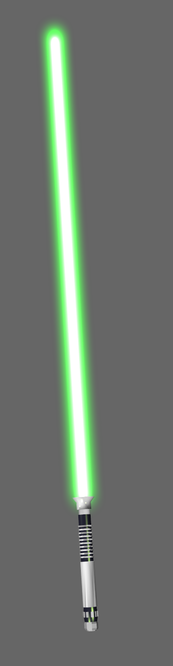 A green lightsaber.